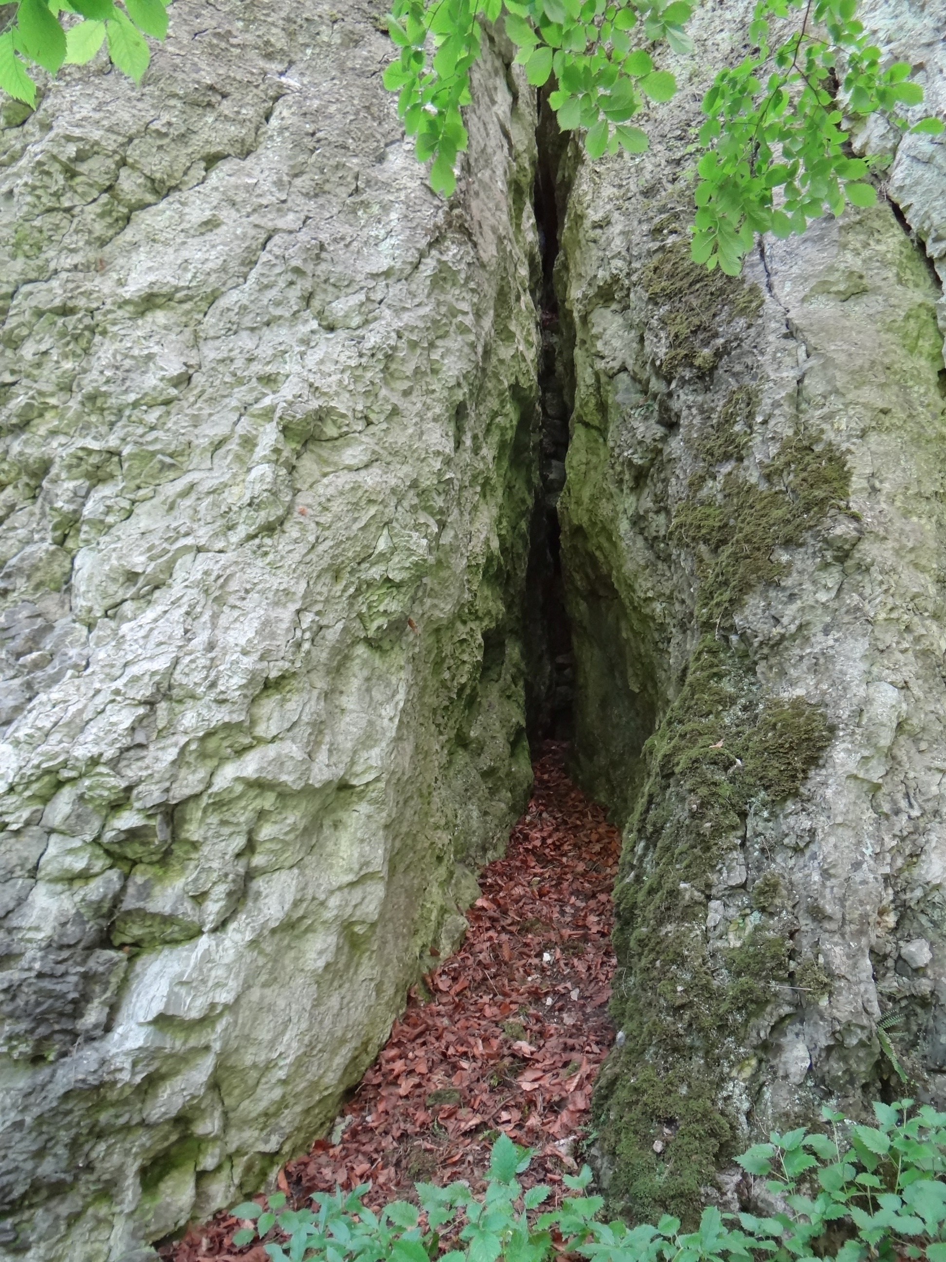 Szczelina pod Schronem Lisa we wzniesieniu Jagodnik w Dolinie Szklarki